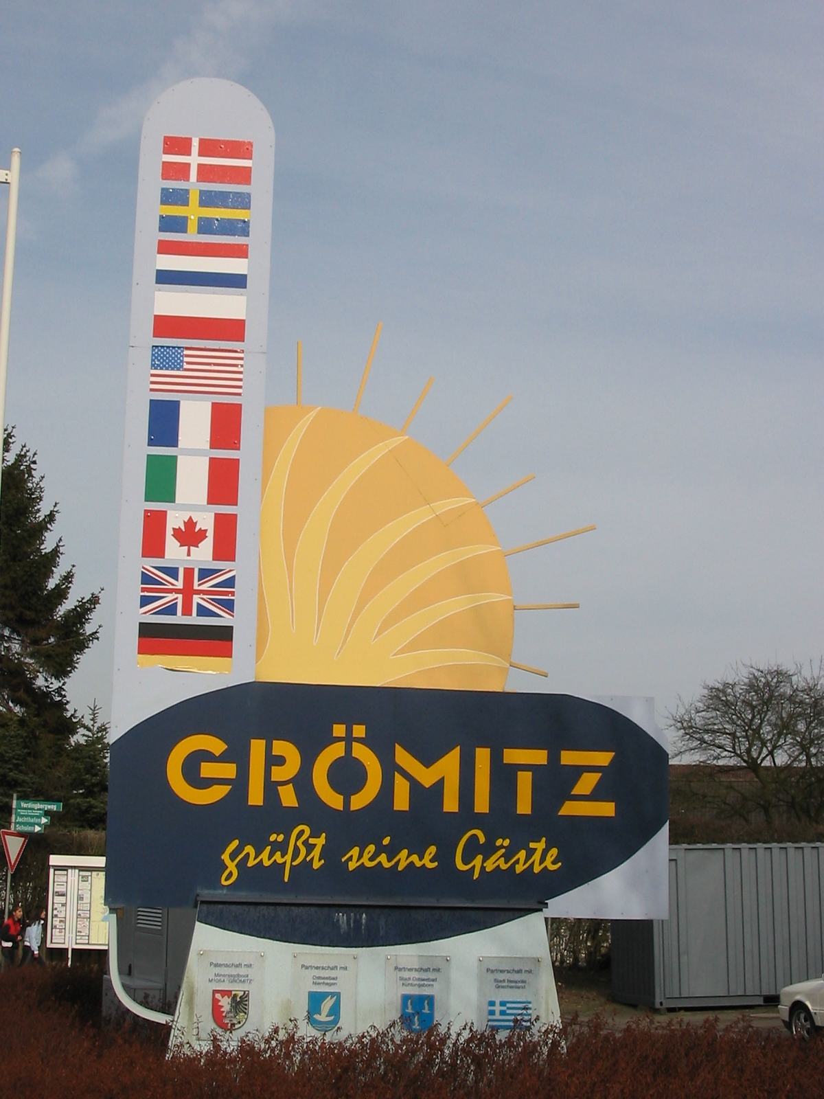 Grömitz grüßt seine Gäste.